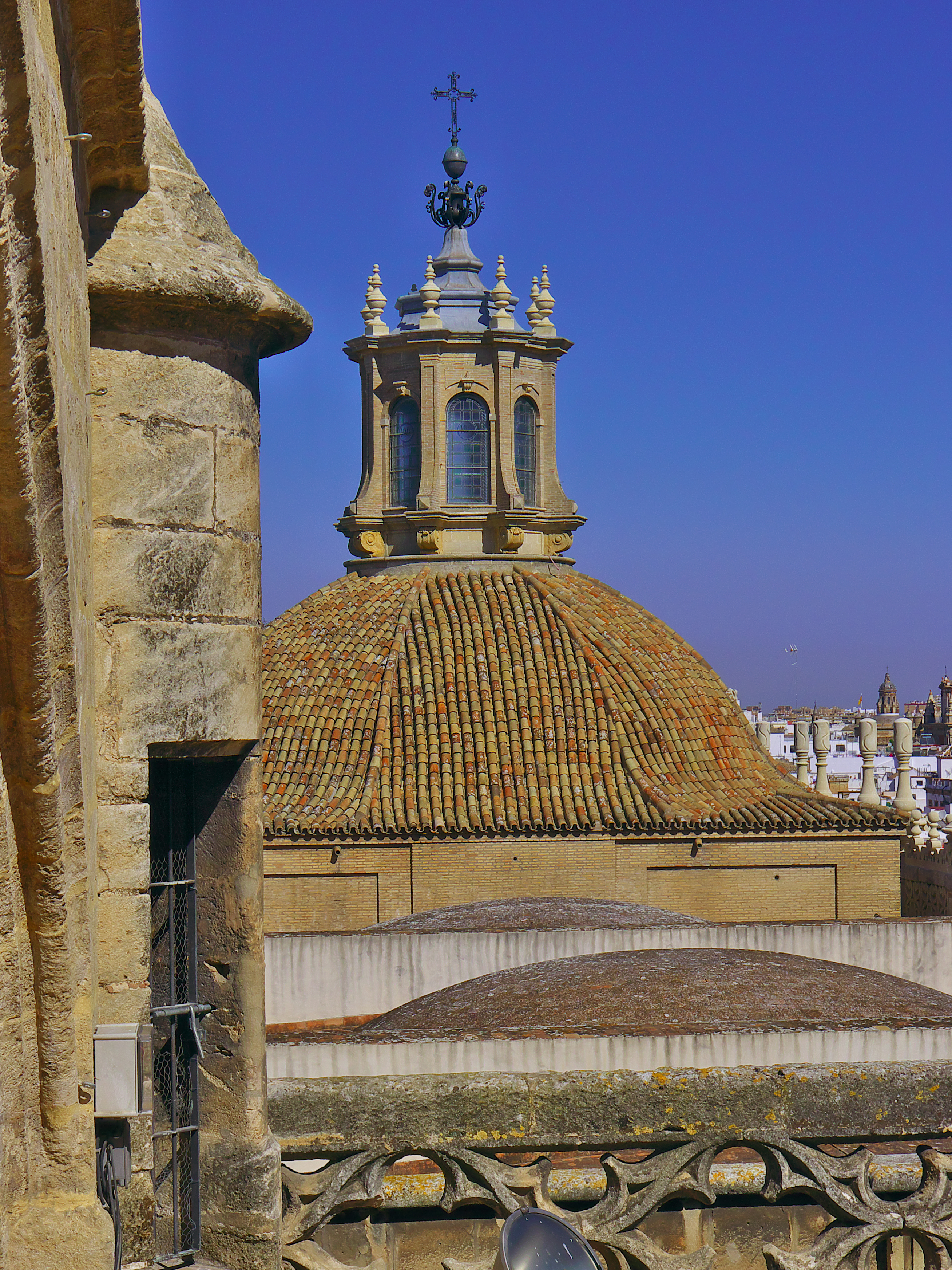 Cúpula barroca de la Iglesia del Sagrario. Sevilla